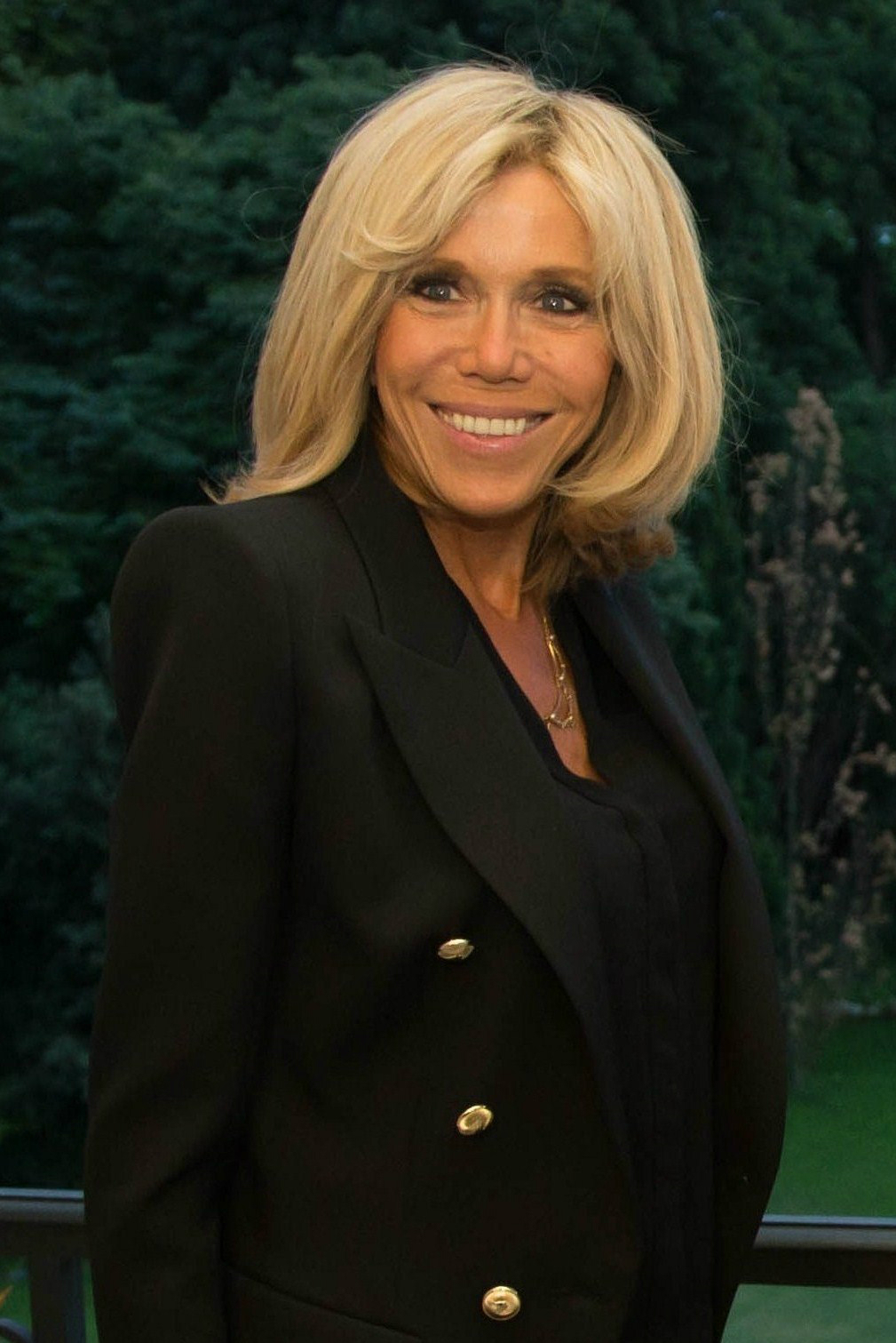 Brigitte Macron, la Première dame de France.